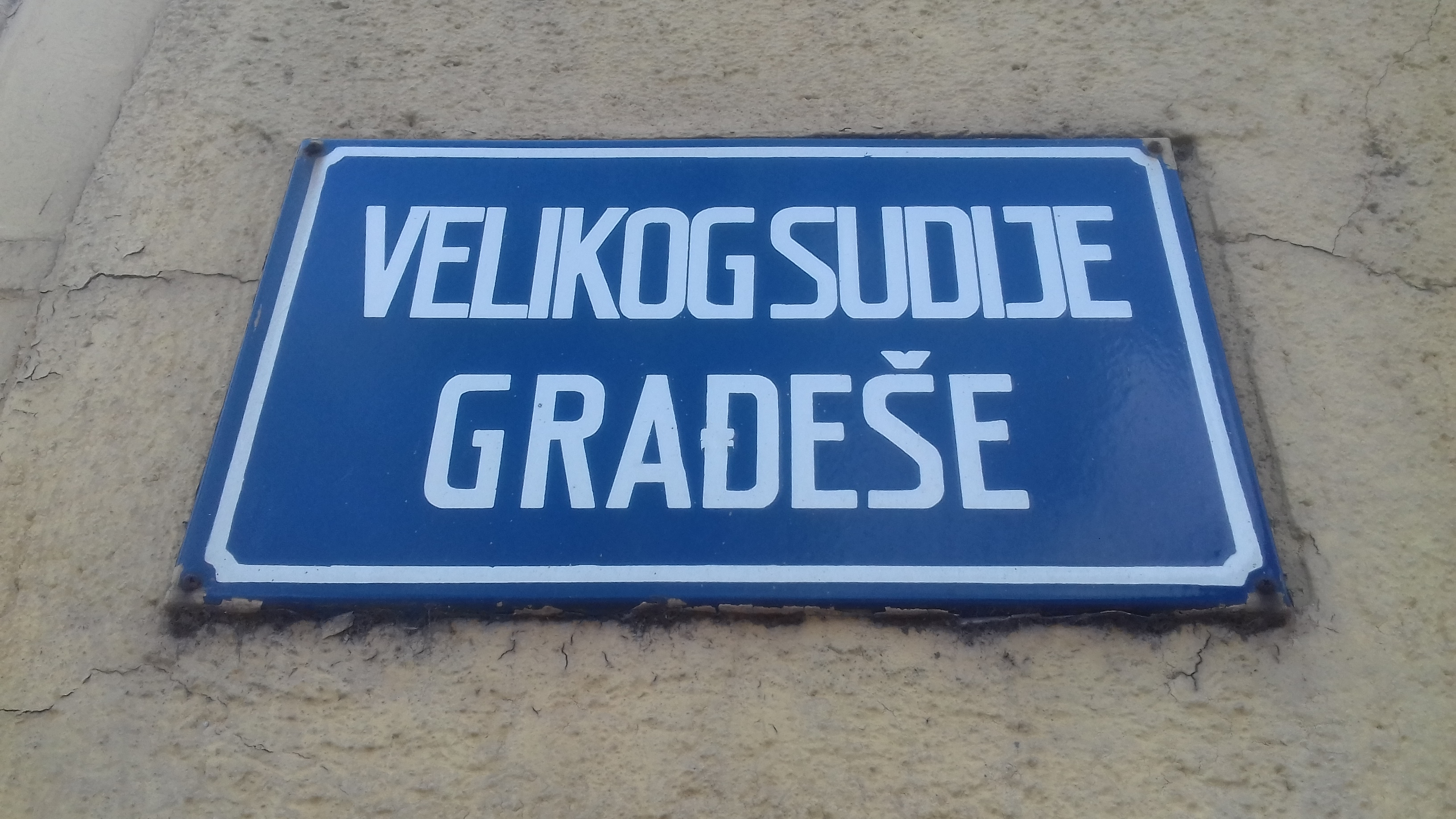 Ulica Velikog sudije Građeše u Novoj Zenici